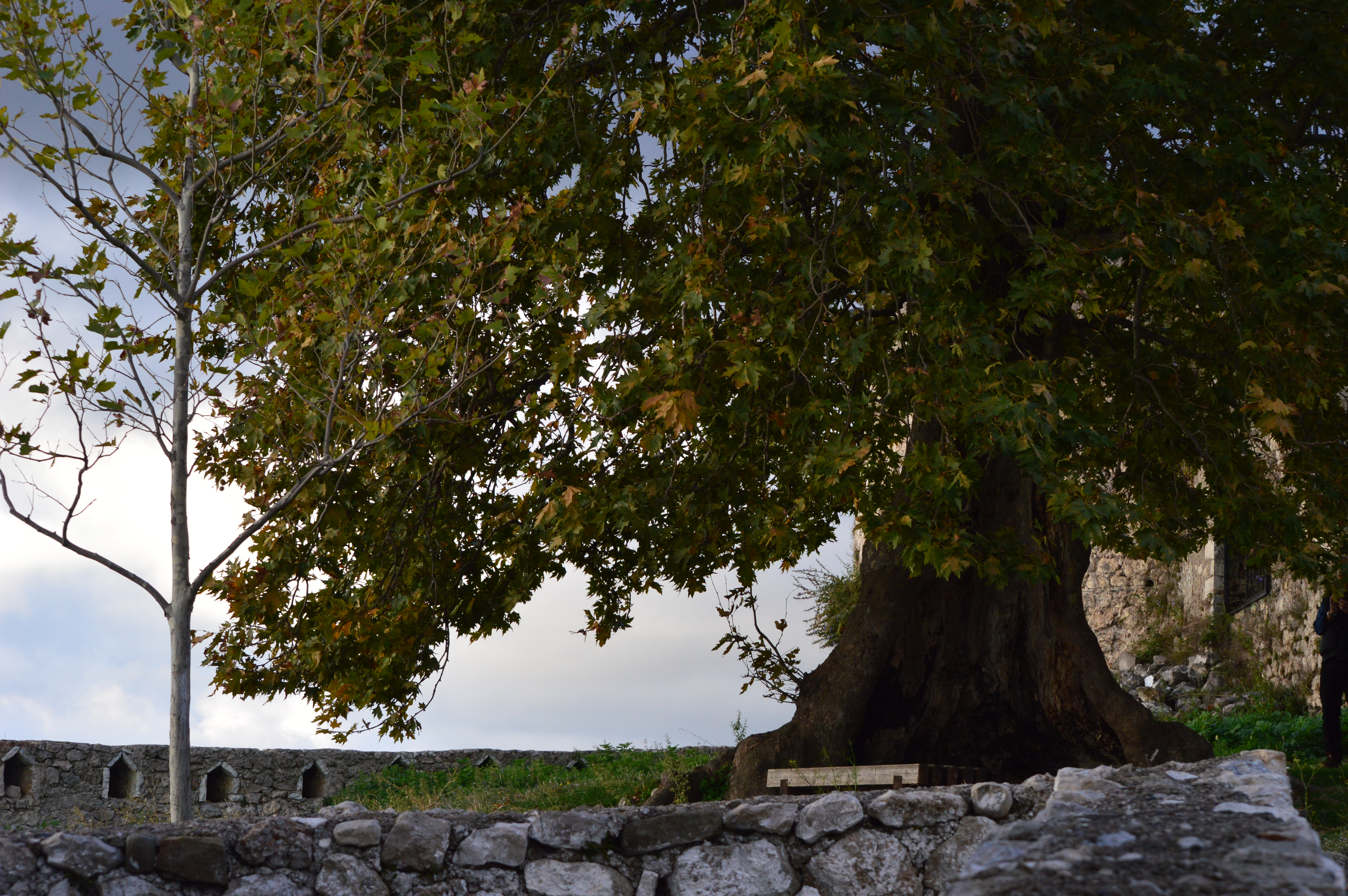 Hrad v Kruji, Albánie